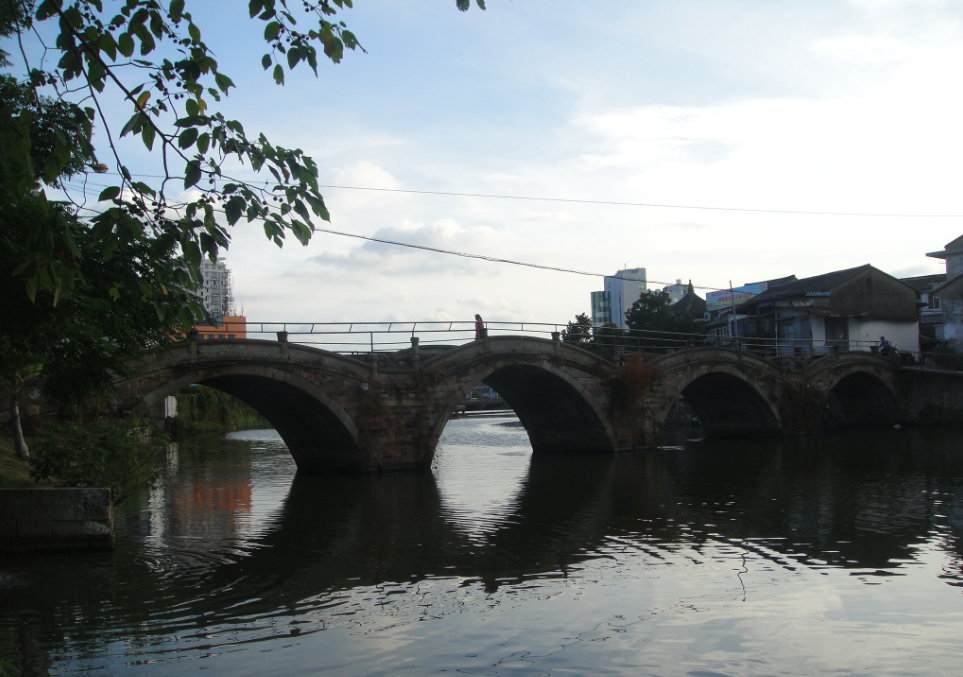 黄岩五洞桥